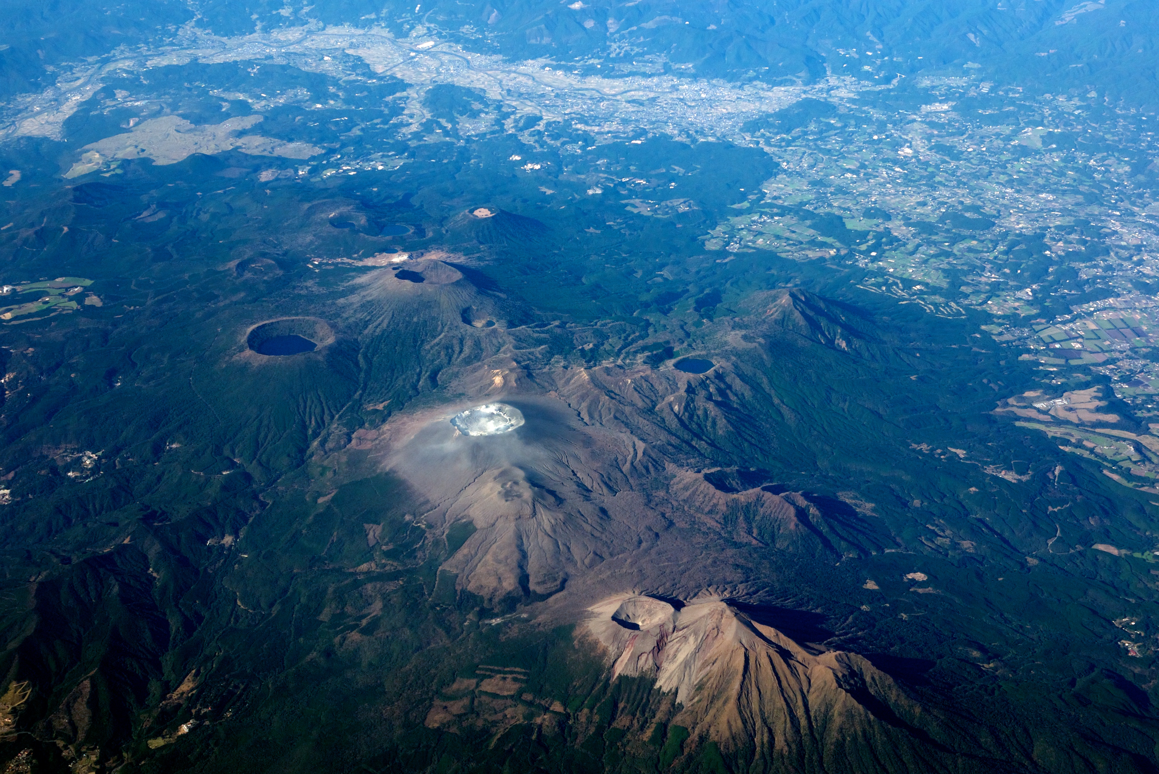 Kirishima volcano as seen from the SSE in Kyushu, Japan.